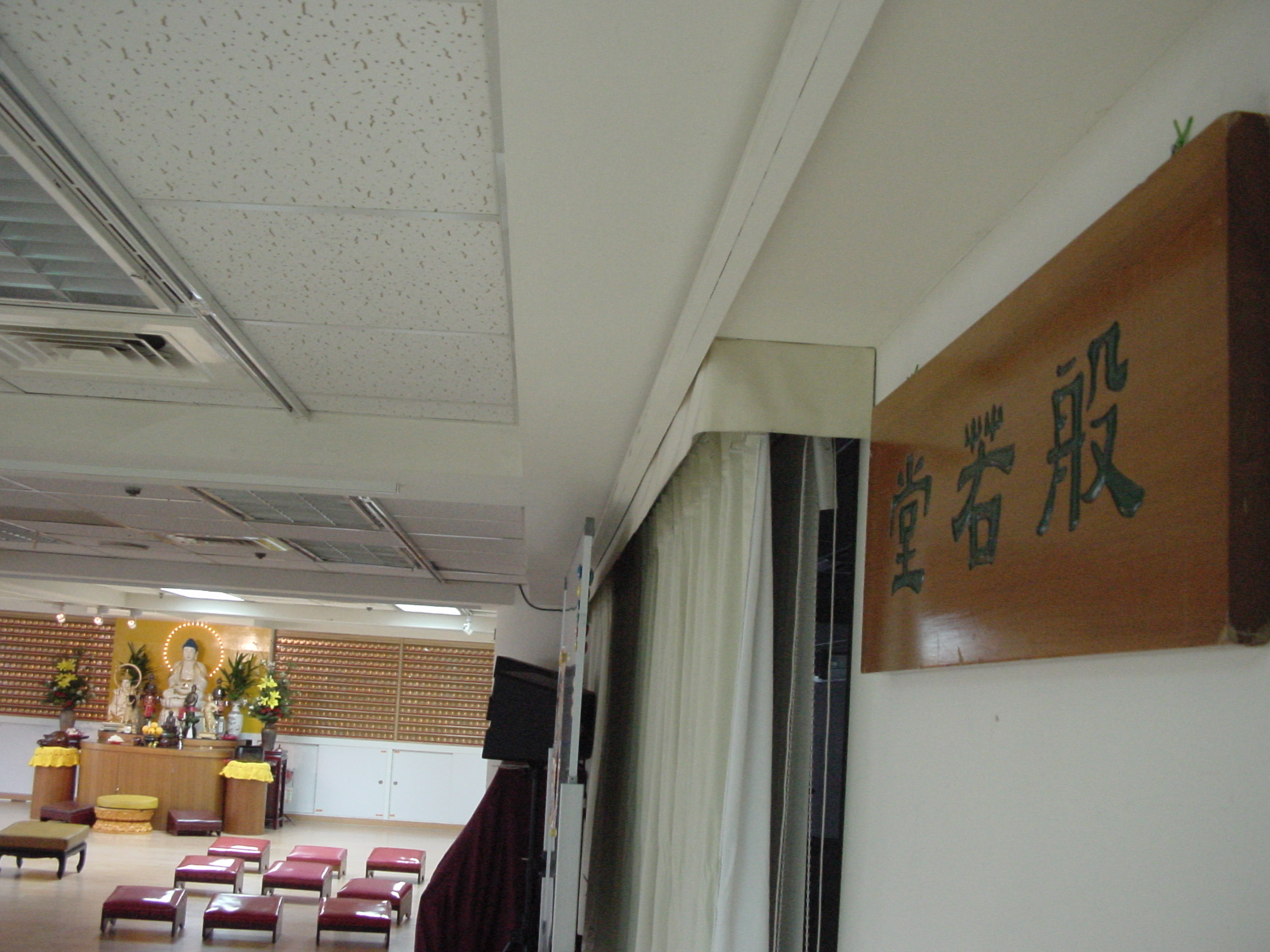 釋曉雲 法師般若堂原設於陽明山永明寺